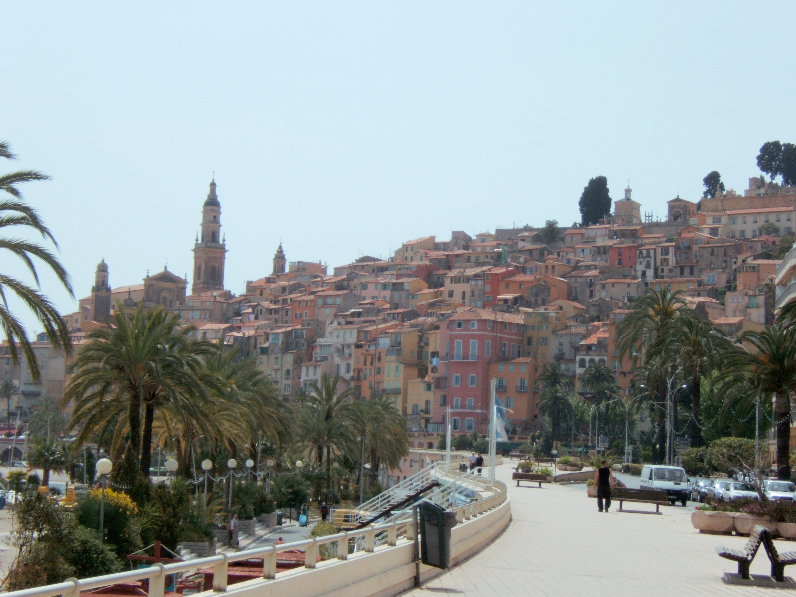 La magnifique ville de Menton, dans les Alpes-Maritimes, vue de l'avenue "Porte de France".